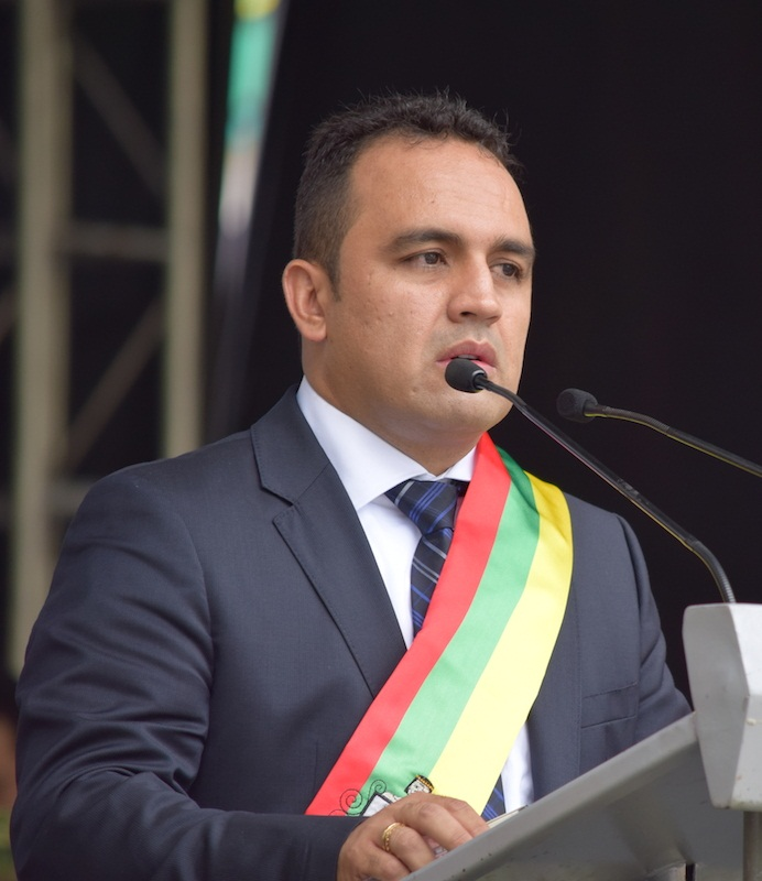 León Mario Bedoya durante su posesión como Alcalde 2016 - 2019